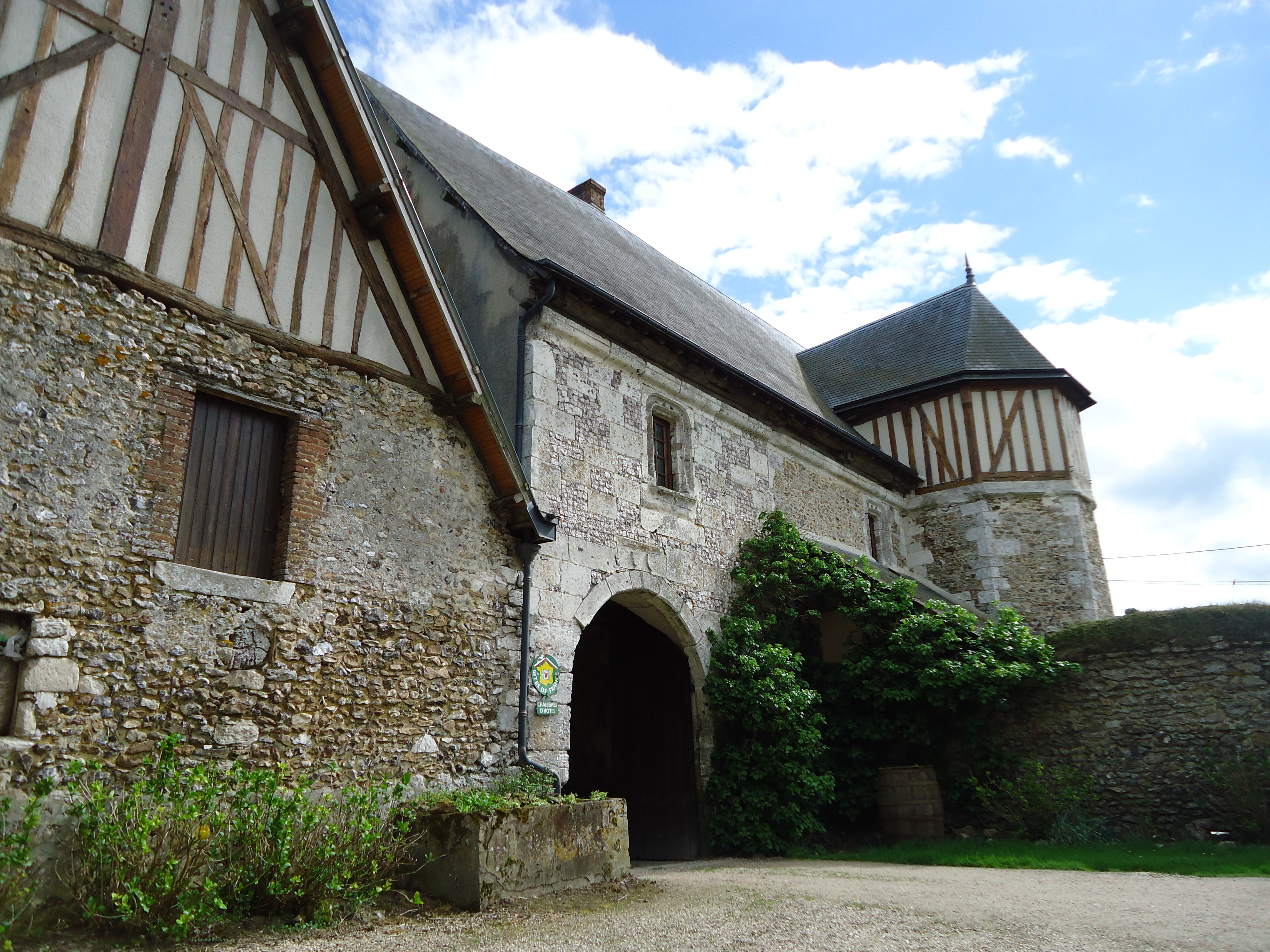 Manoir de la Boissière, XVe (ISMH) - Hameau de la Boissaye - La-Croix-Saint-Leufroy (27) - France It is indexed in the Base Mérimée, a database of architectural heritage maintained by the French Ministry of Culture, under the references PA00099381 and IA00017698 .